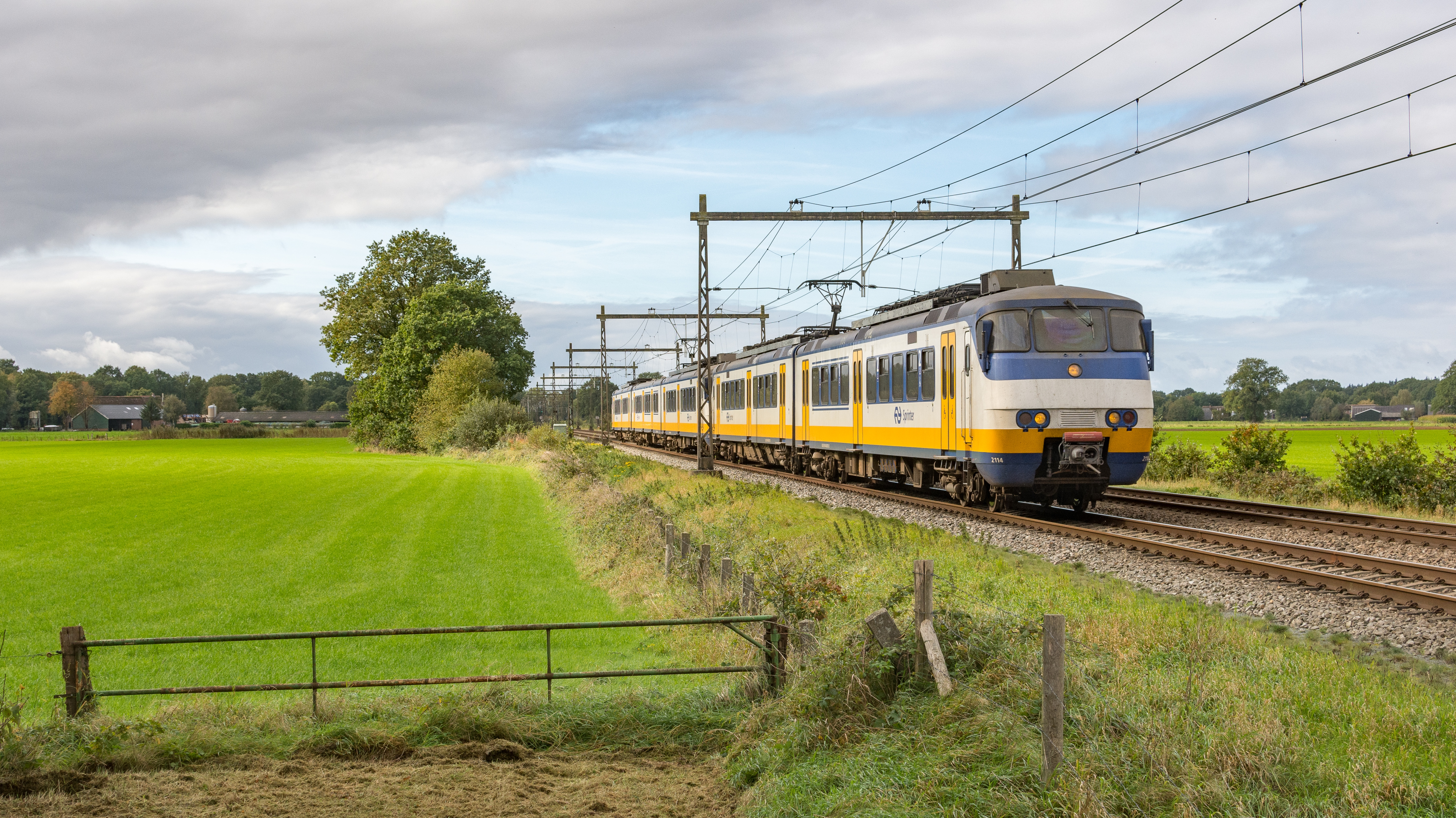 SGMm 2114-2943 als Sprinter 7039 naar Almelo. Hier onderweg bij Bathmen